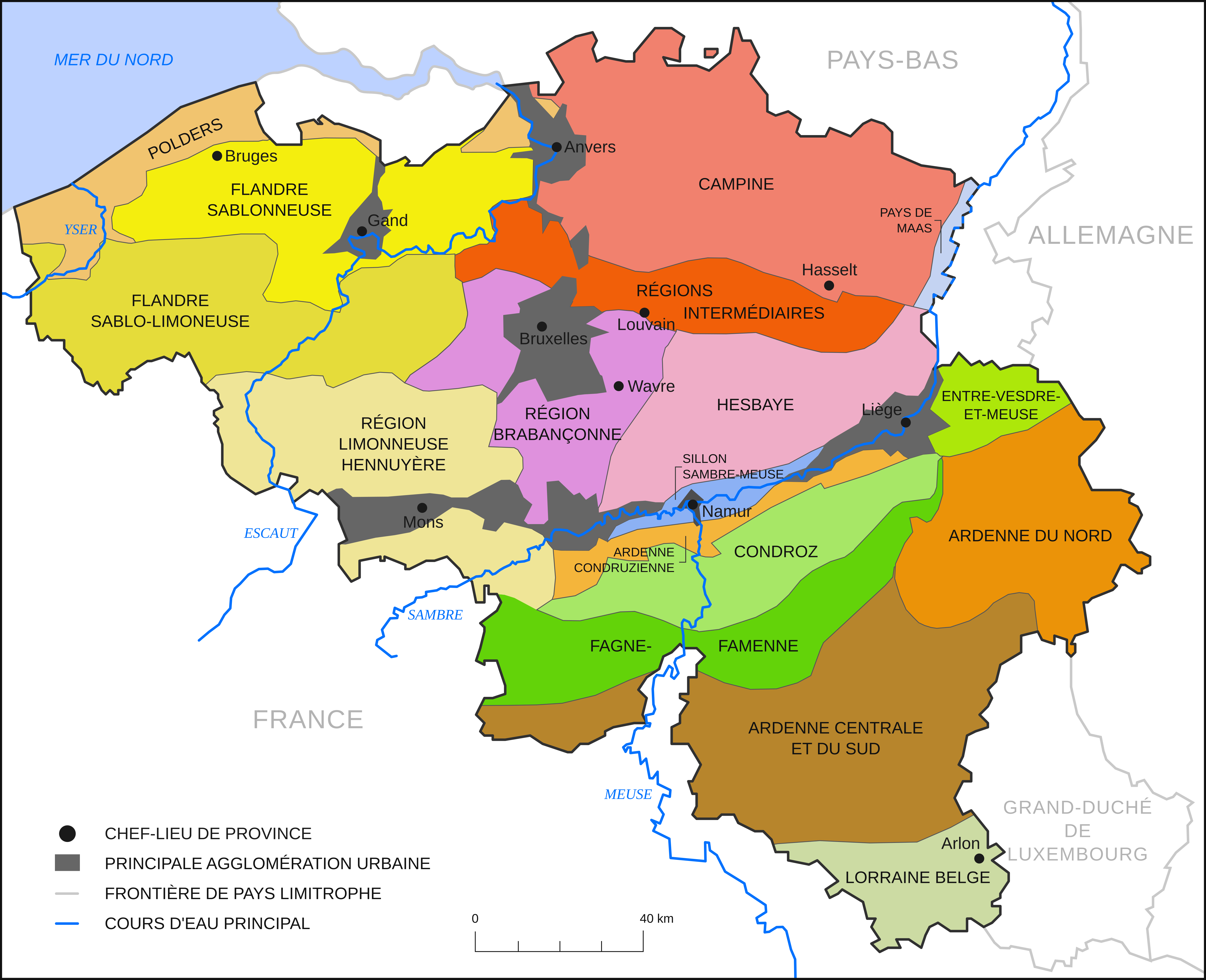 Régions naturelles de Belgique, avec les principales agglomérations urbaines et les chefs-lieux des provinces.